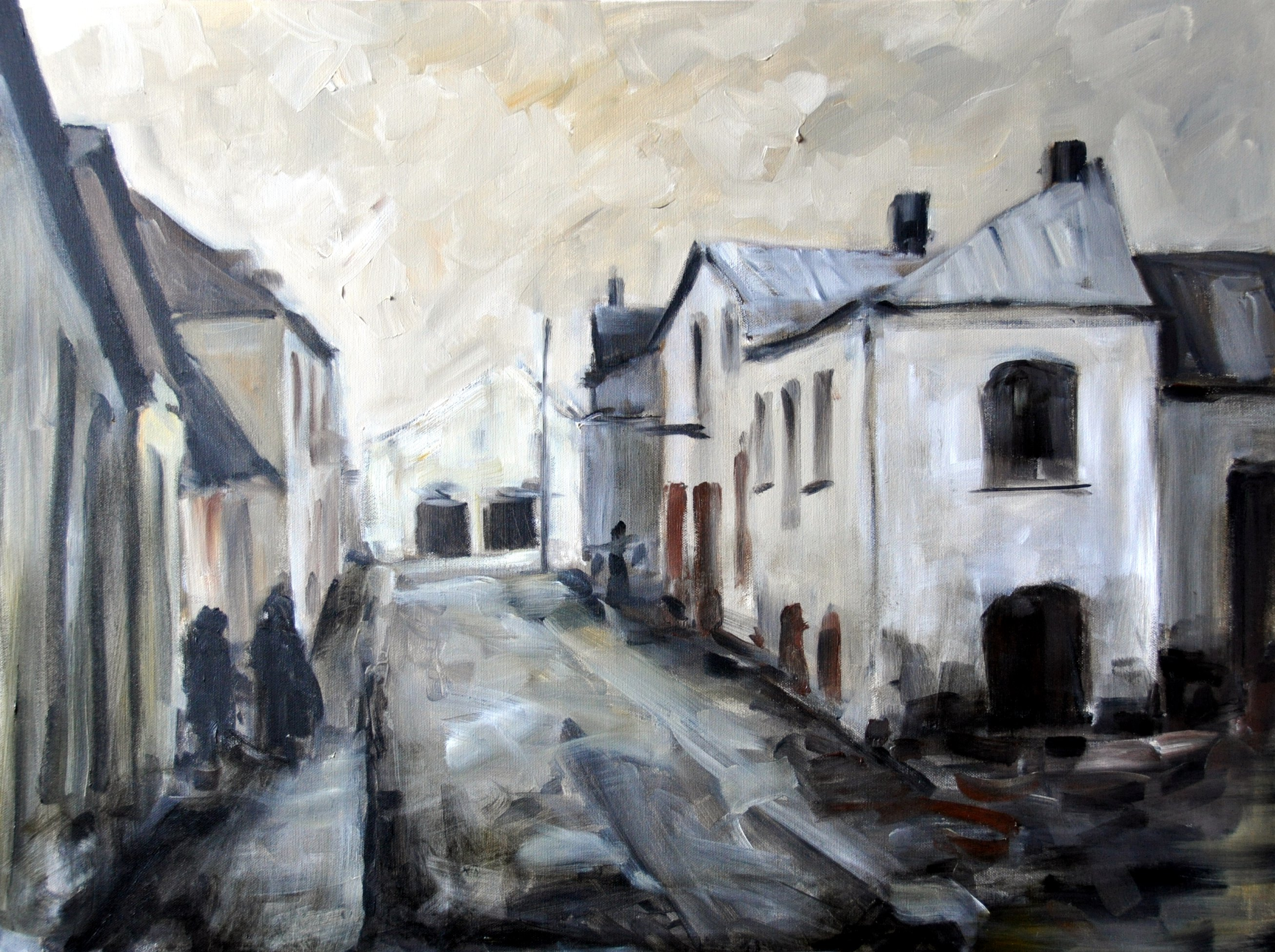 Paweł Brodzisz - artysta malarz, ur. 1975 r. w Łęcznej. W 2005 r. ukończył studia na Wydziale Artystycznym UMCS w Lublinie, specjalizacja - Malarstwo. Najchętniej maluje w technice olejnej, pierwsze prace wykonał w 1994r. Pracuje w Centrum Kultury w Łęcznej. Obok malarstwa interesuje się grafiką i fotografią oraz historią swojego miasta – Łęczna. Członek Łęczyńskiego Stowarzyszenia Twórców Kultury i Sztuki PLAMA i Towarzystwa Przyjaciół Ziemi Łęczyńskiej.